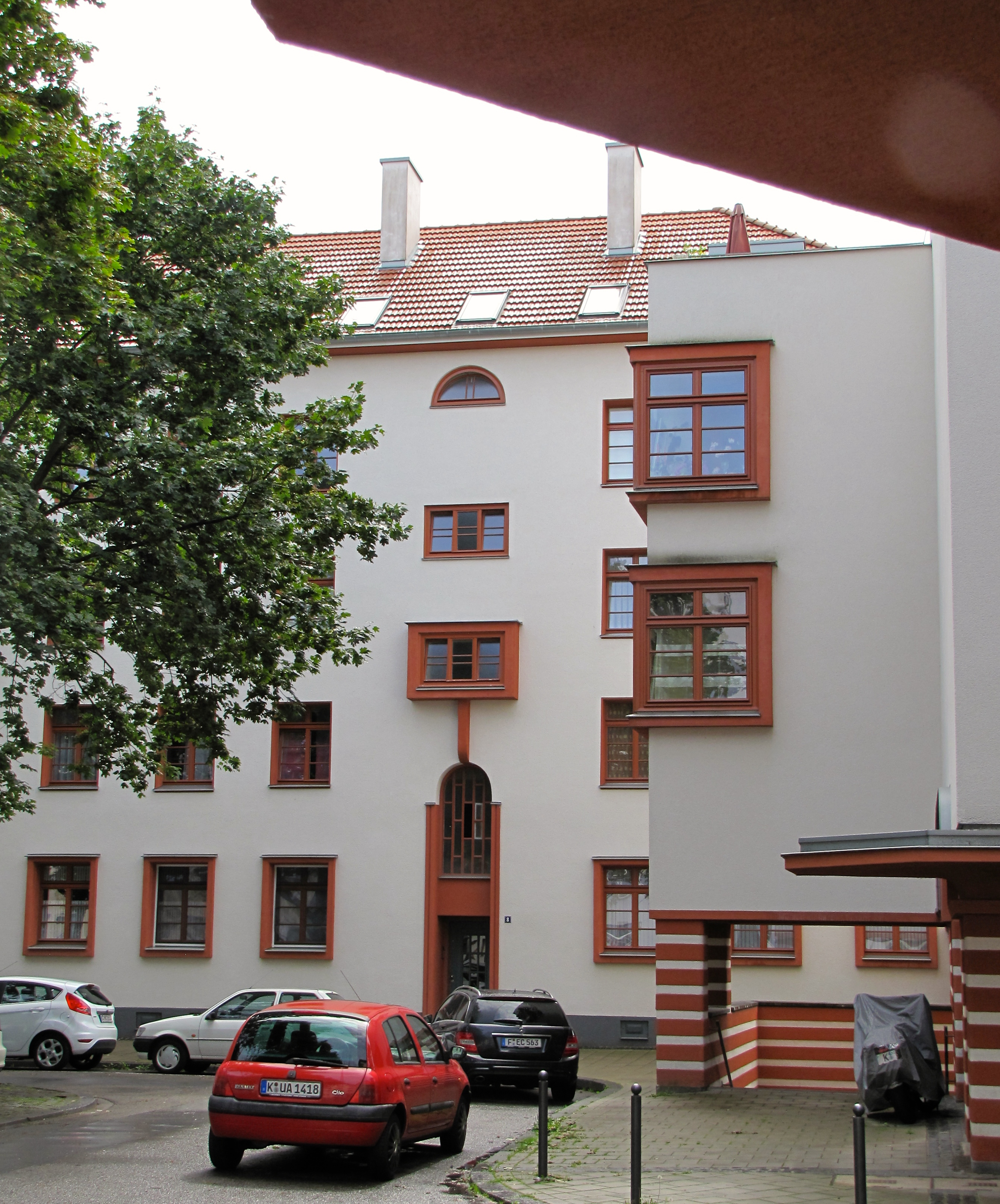 Köln Riehl: Naumannsiedlung, erbaut 1926 - 1930